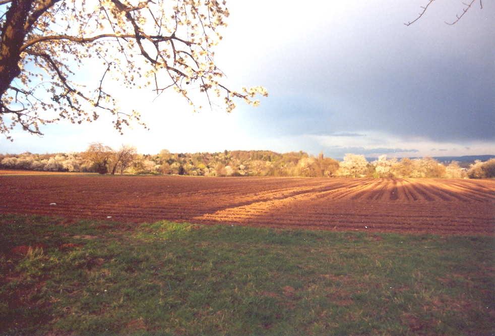 Blick aus Richtung Friedberger Landstrasse auf den Lohrberg (links) und Frankfurt-Seckbach (rechts)